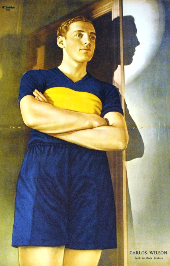 Carlos Wilson futbolista nacido en 1915, jugó en Boca Juniors y Talleres de Escalada